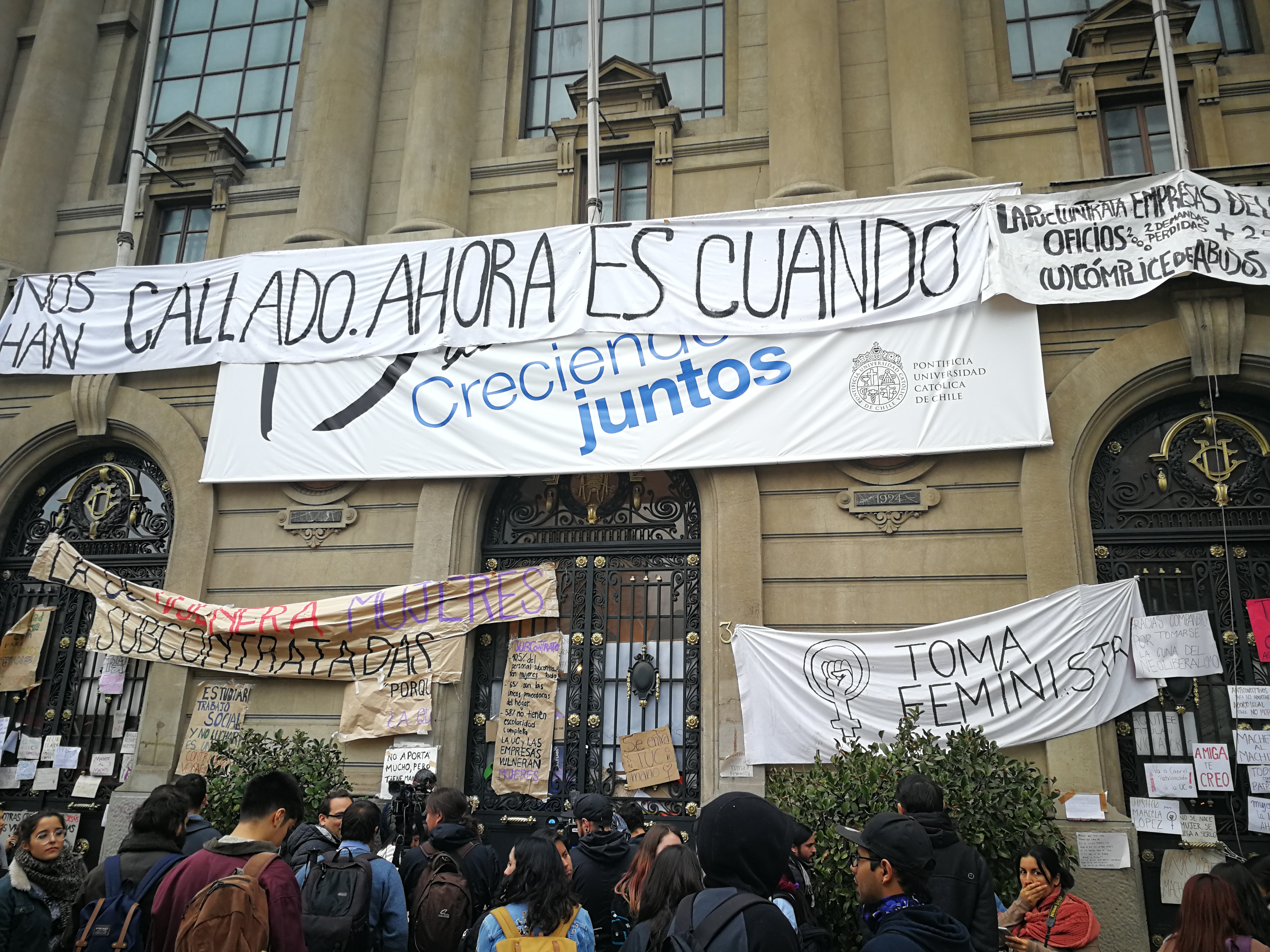 Imagen de la toma feminista en la casa central de la Pontificia Universidad Católica de Chile (PUC) en 2018.